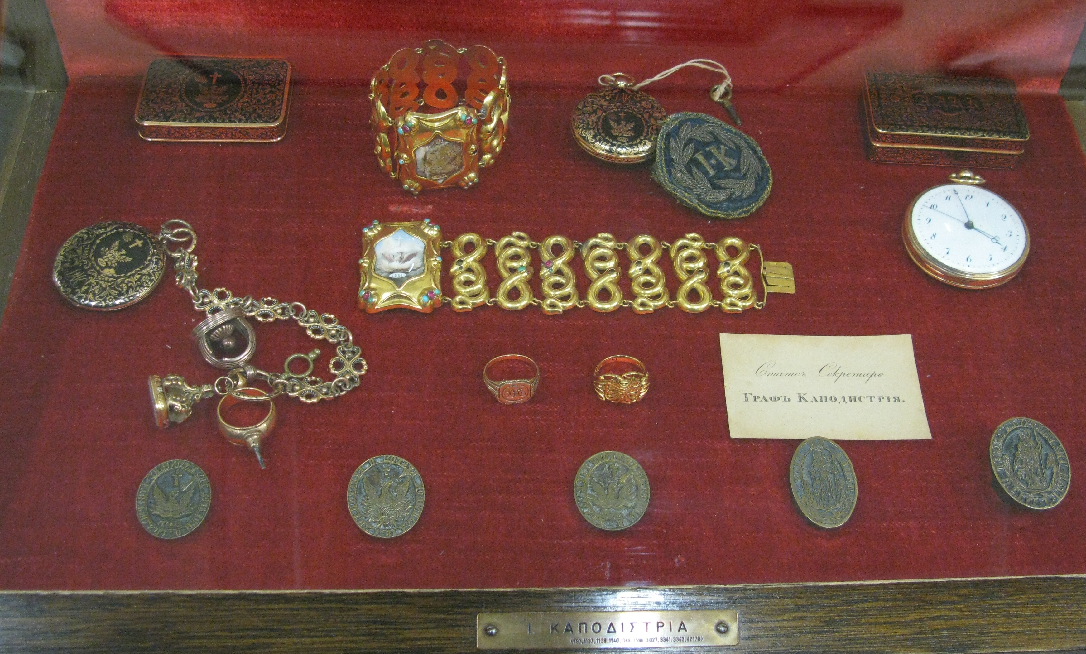 National Historical Museum, Athens, Greece --- Αντικείμενα του Ιωάννη Καποδίστρια. Εθνικό Ιστορικό Μουσείο. Αθήνα.